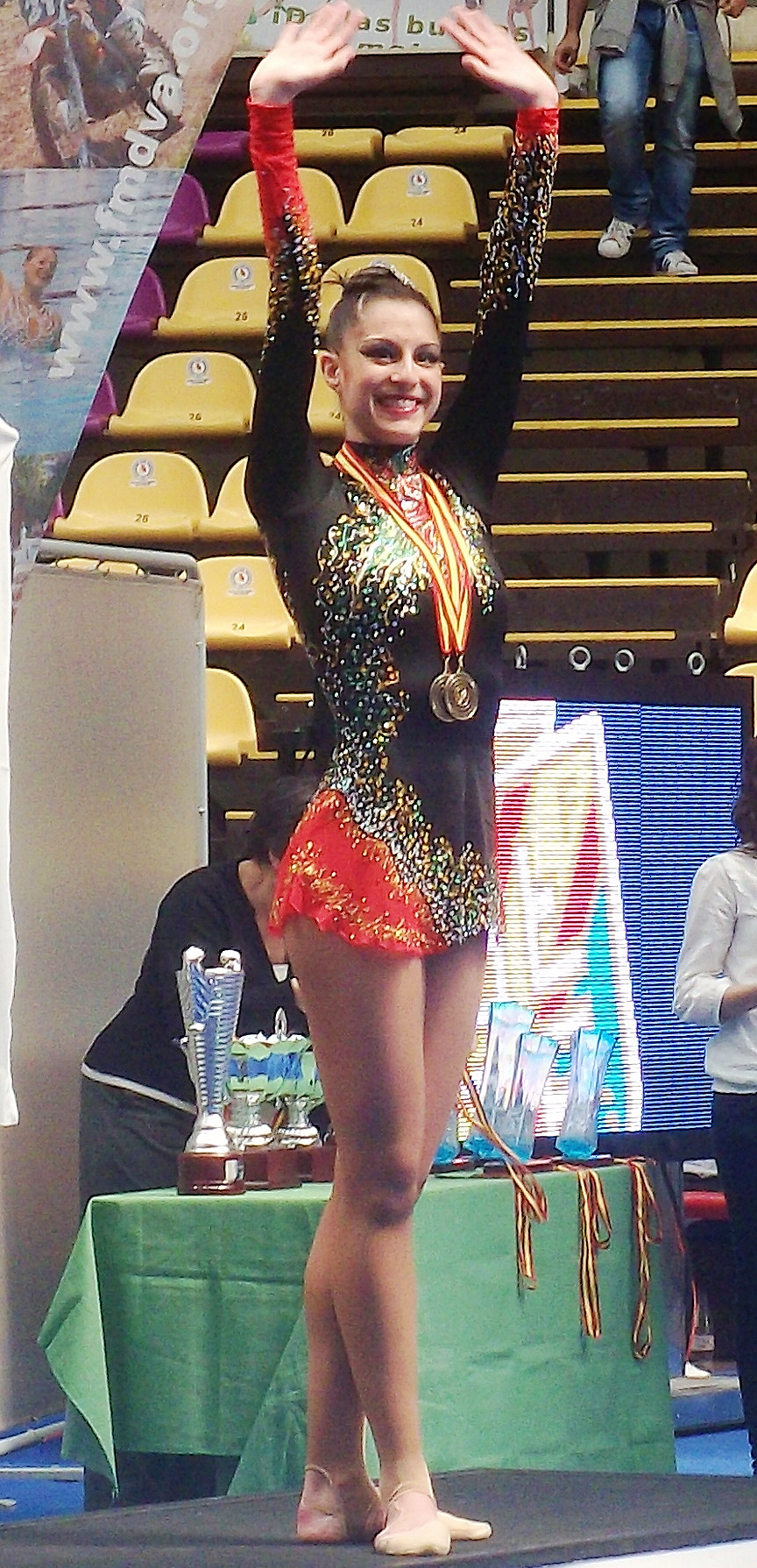 Carolina Rodríguez en la Copa de la Reina 2011.